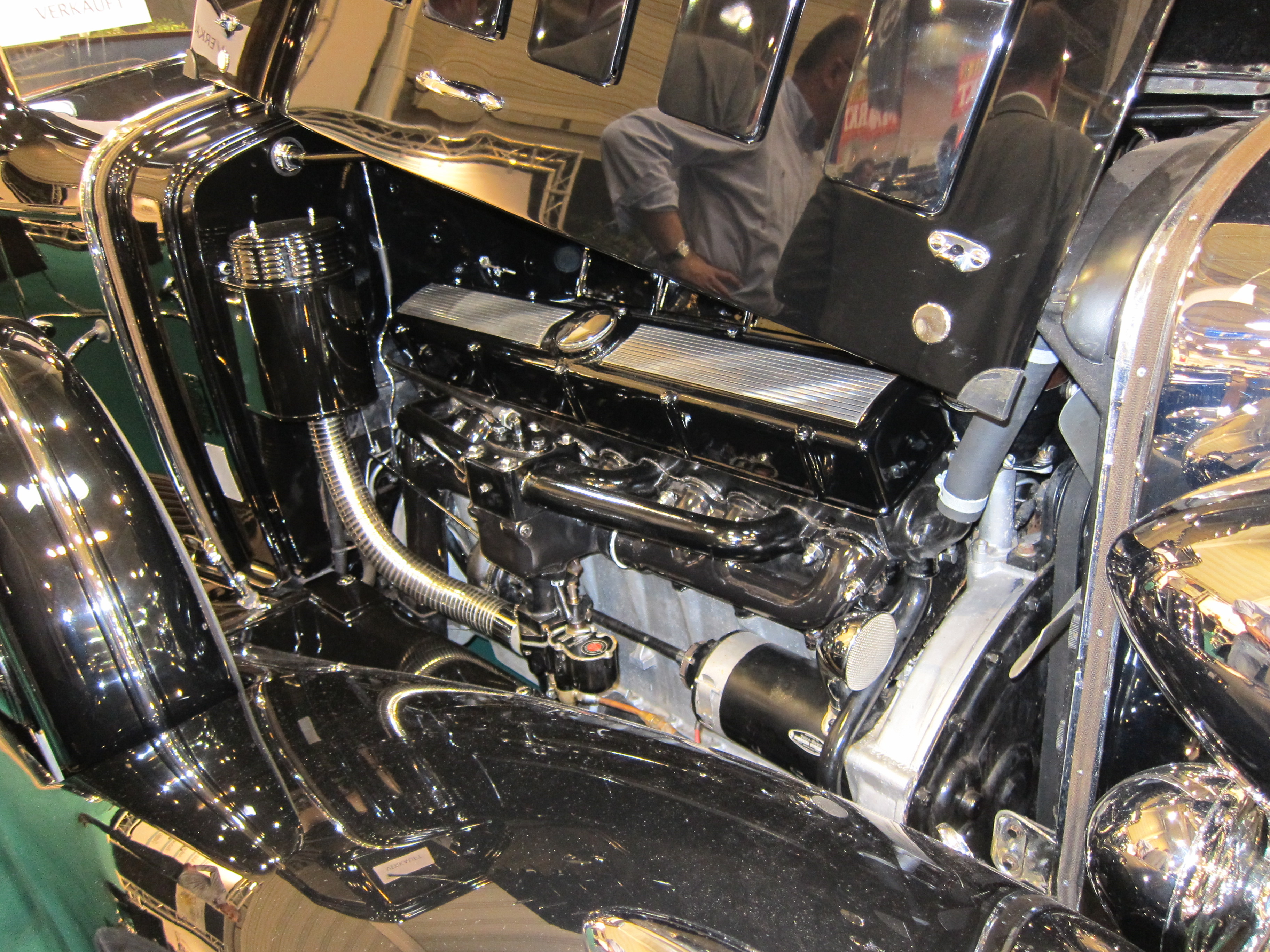 Techno Classica 2012